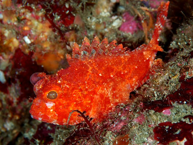 フサカサゴ Scorpaena onaria